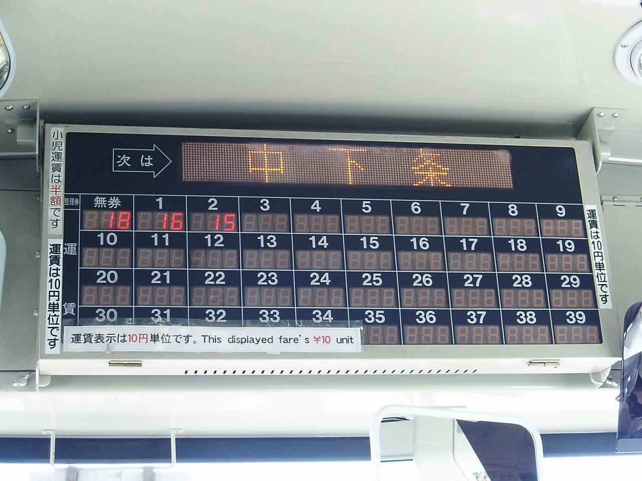 Yamanashi Kotsu Digital Fare Board 10円単位で表示される